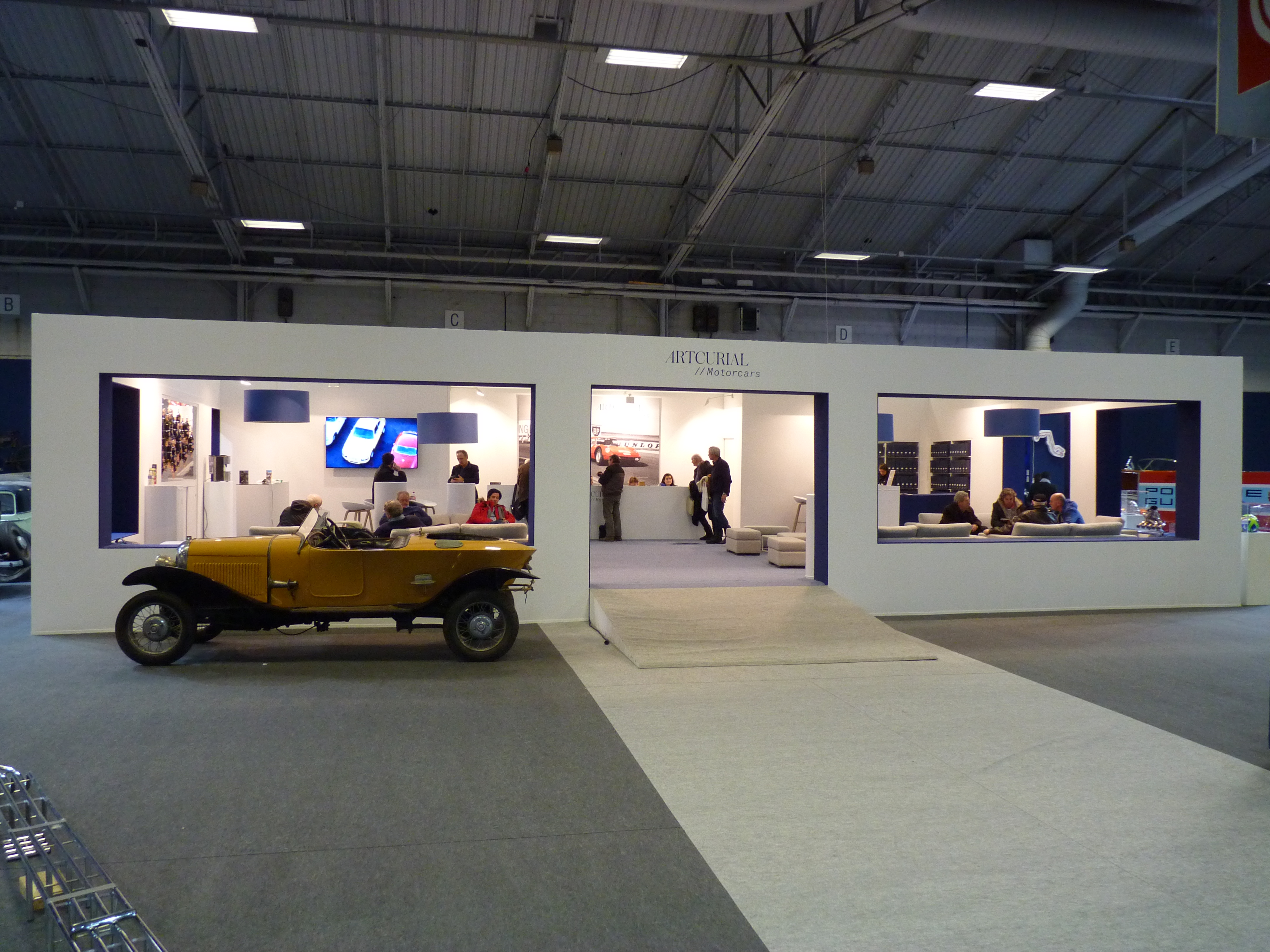 Vente aux enchères Artcurial Rétromobile 2018